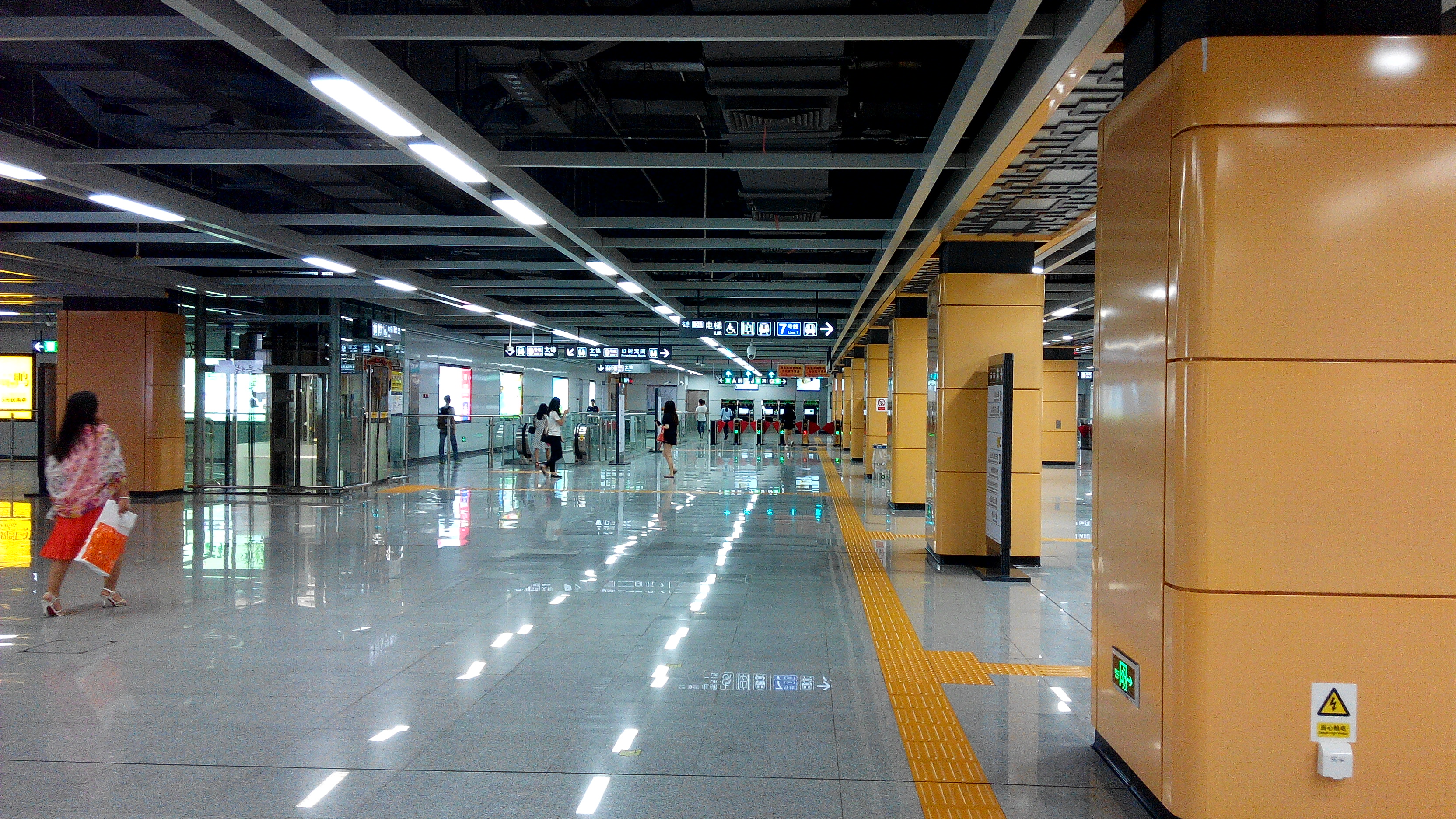 深圳地铁7、9号线 红岭南站大堂